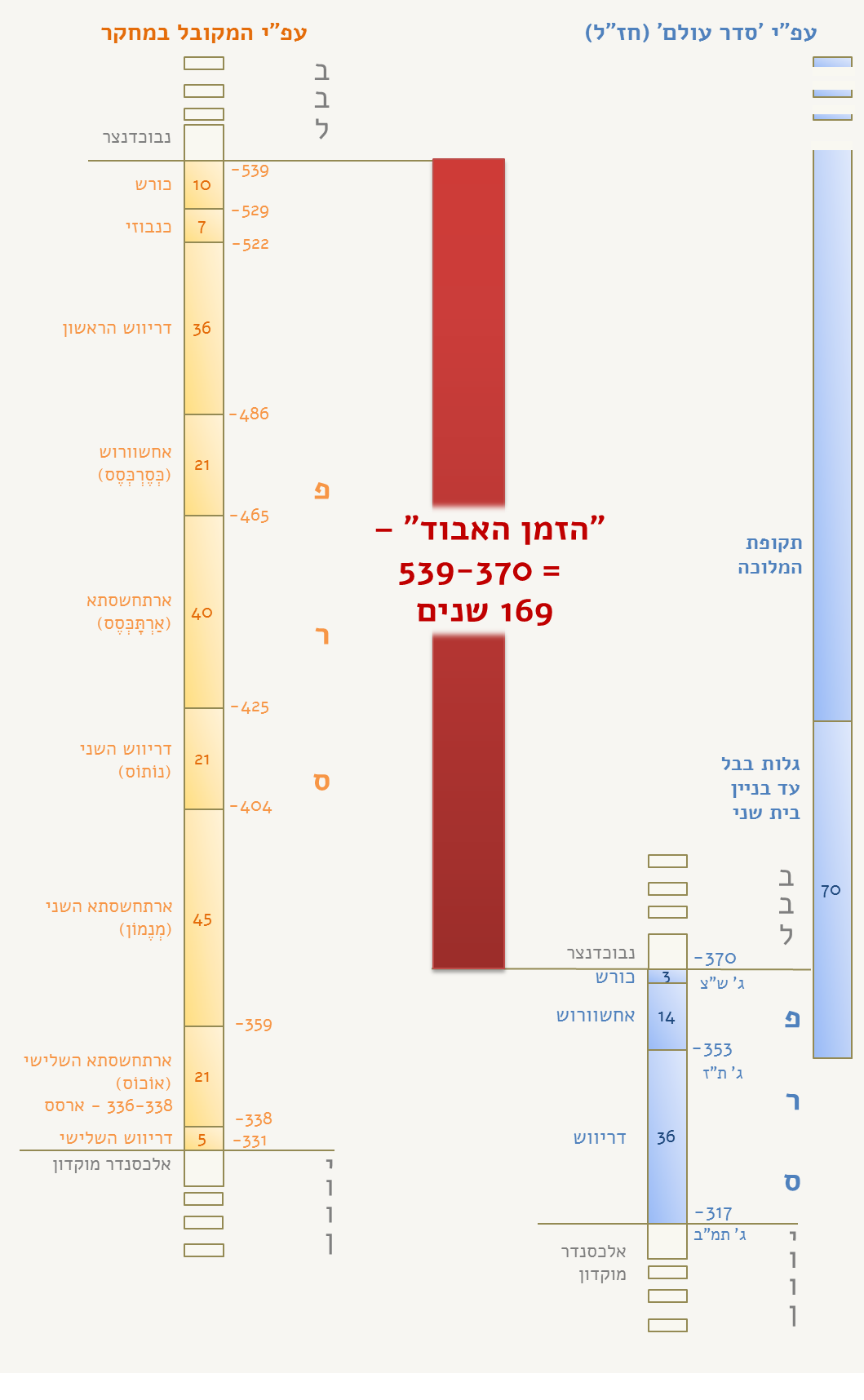 סדרי הזמנים של מלכות פרס וימי הבית השני - חז"ל לעומת המחקר המקובל